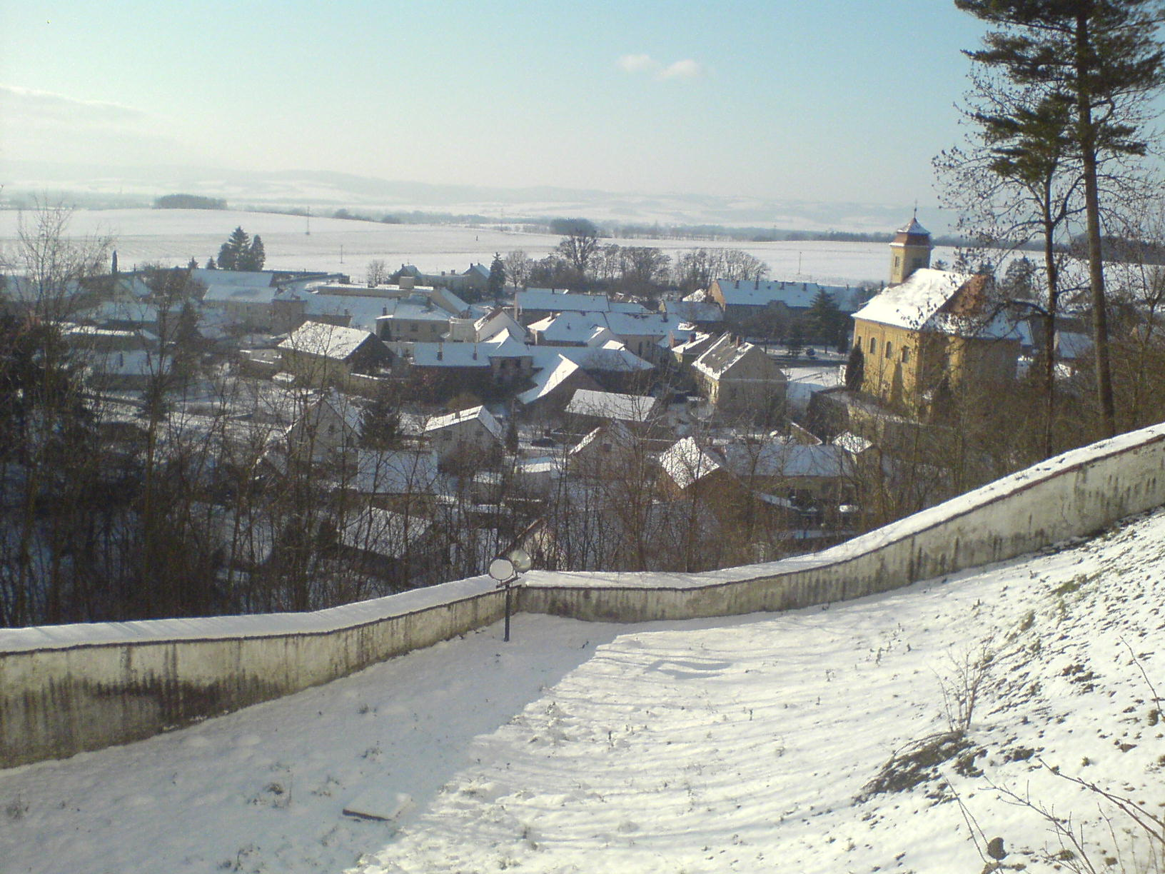 Úsov, celkový pohled